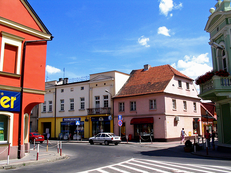 Skrzyżowanie ulic Wrocławskiej, Powstańców Wielkopolskich, Kolejowej i 1 Maja w Gostyniu.